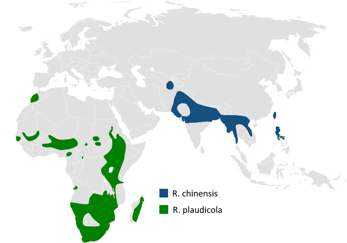 Riparia chinensis / paludicola distribution map, based on /